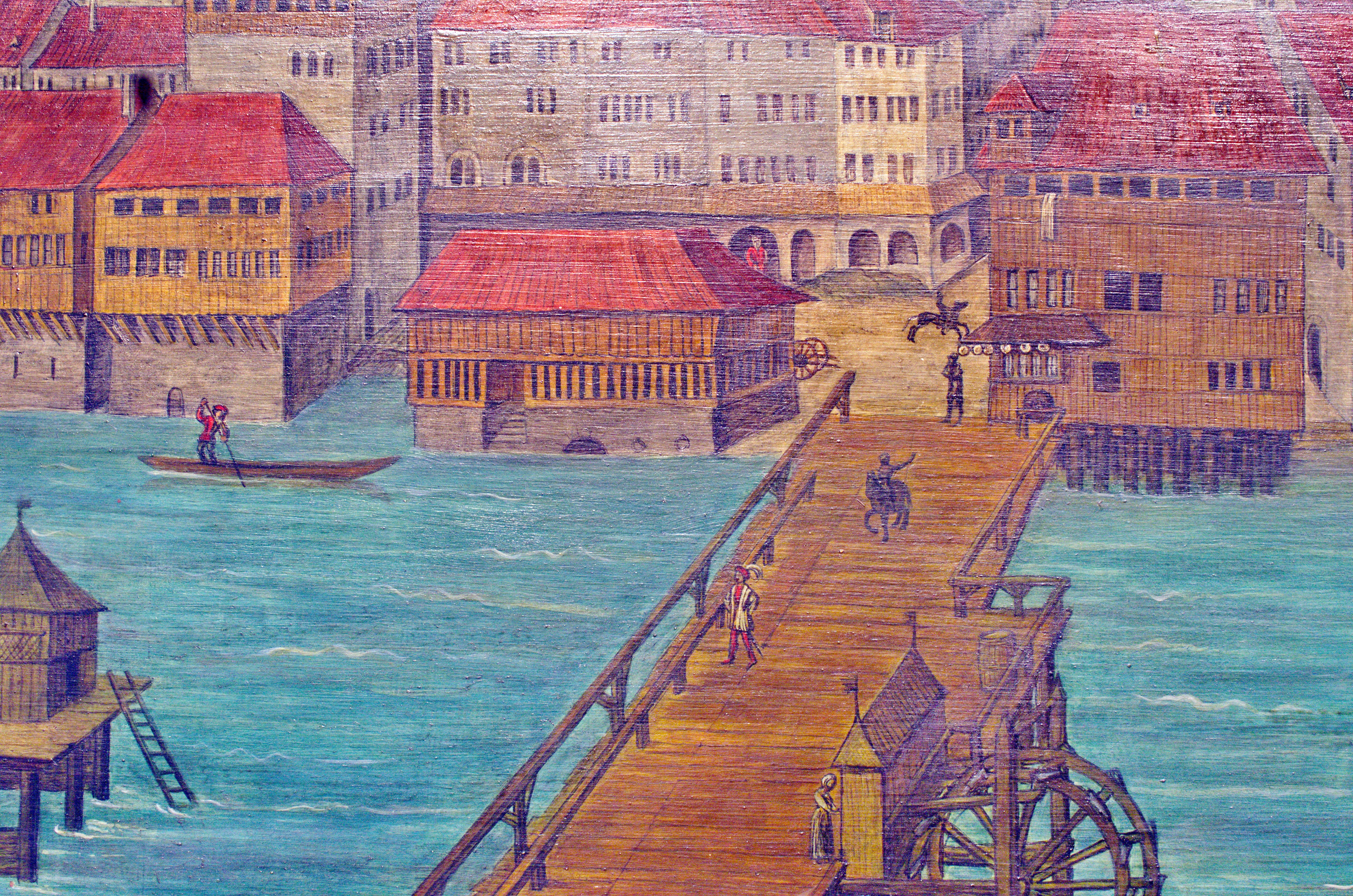 Der Weinplatz und die Rathausbrücke auf der Replik der Altartafeln von Hans Leu im Baugeschichtlichen Archiv der Stadt Zürich im Haus zum Rech. Die Panoramansicht des linksseitigen Limmatufers – 'Standort' der BetrachterIn ist wohl der Karlsturm des Grossmünsters – von Hans Leu d. Ä. gilt als die älteste zuverlässige Darstellung der Stadt Zürich, Ende des 15. Jahrhunderts auf den Altartafeln im Grossmünster mit viel Liebe zum Detail festgehalten. Die originalen Tafeln sind heute im Landesmuseum ausgestellt, eine (vermutlich) 1:1 Replik ist im Stadtarchiv öffentlich zugänglich.